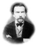 Innocenzo Manzetti (Aosta, 1826-1877), il "vero" inventore del telefono